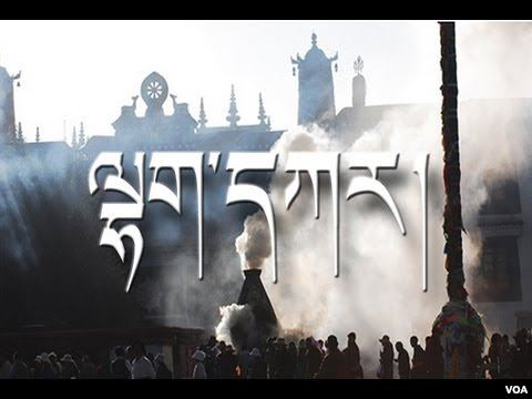 Lhakar in Lhasa